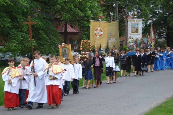 Procesja Bożego Ciała, 2008 rok